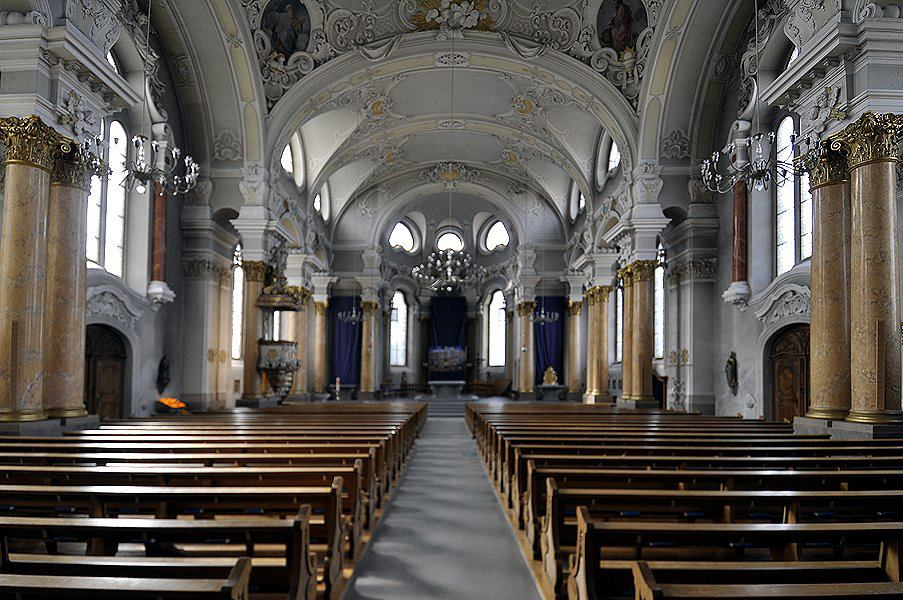 Innenansicht der Pfarrkirche S. Nikolaus, Frauenfeld